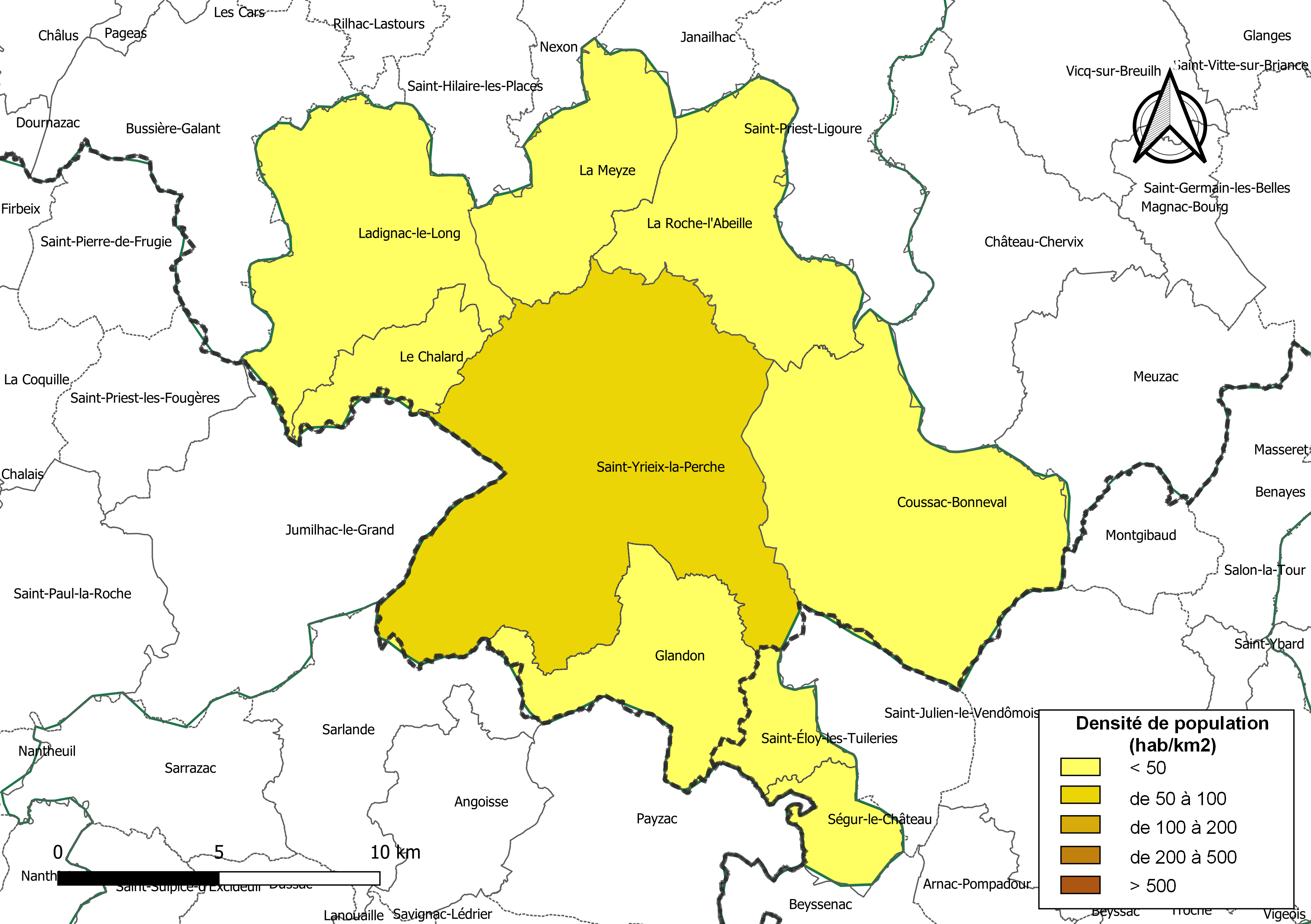 Carte des densités de population (millésimée 2016) des communes de la Communauté de communes du Pays de Saint-Yrieix, département de la Haute-Vienne, France. Composition au 1er janvier 2019.